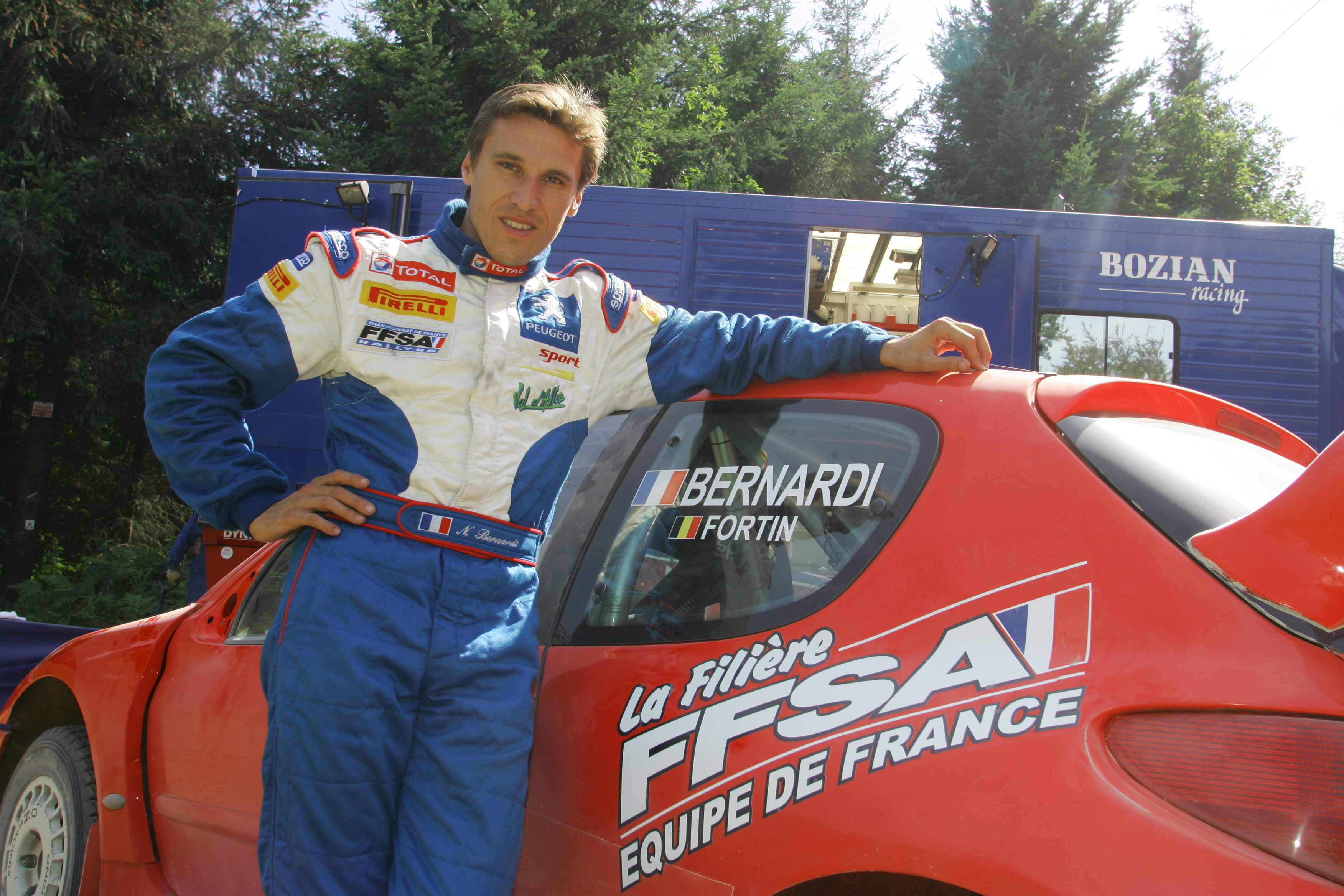 Séance de Test GB Rally